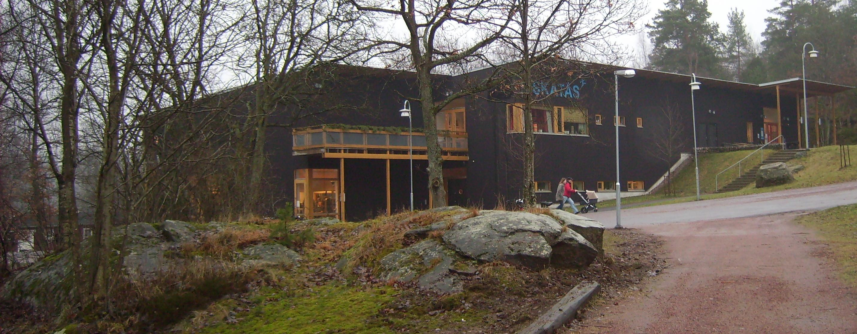 Skatås in Gothenburg.